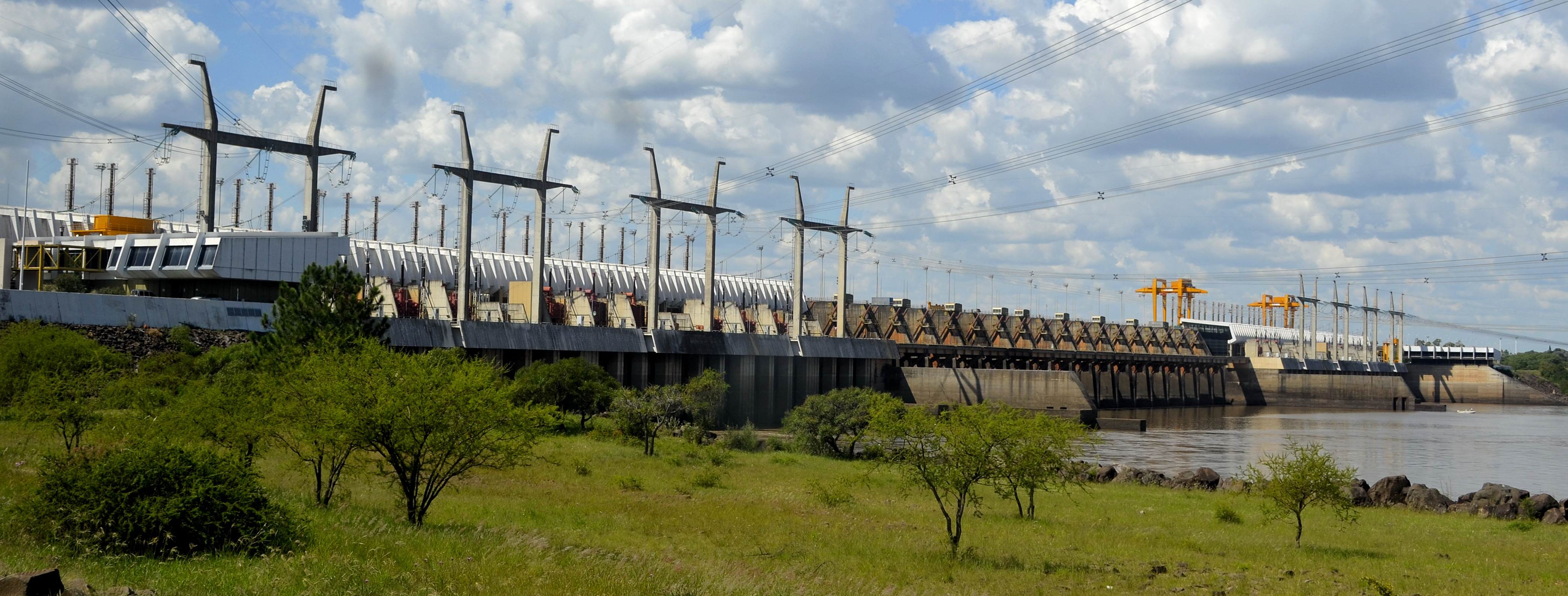 Represa lado argentino